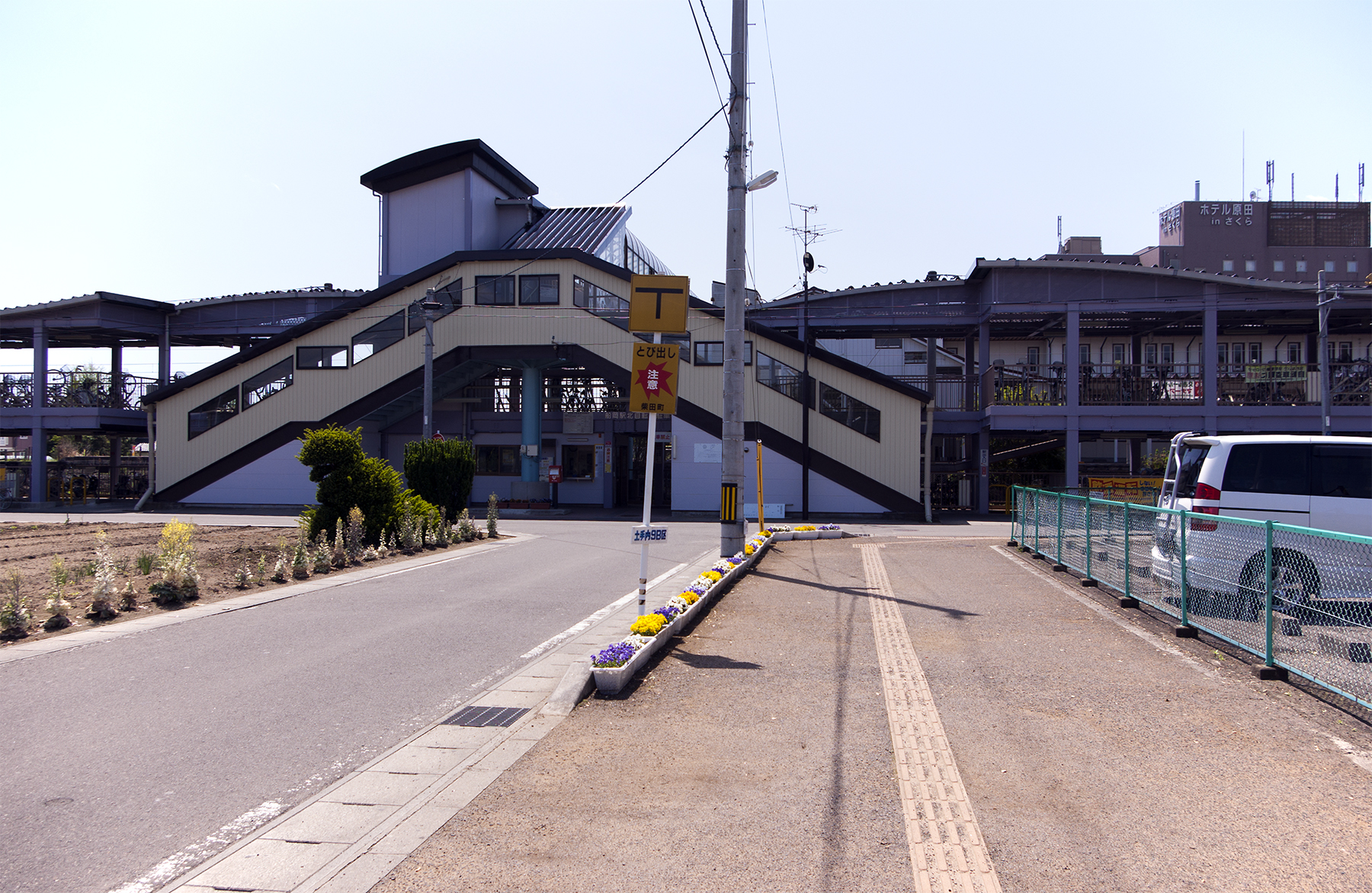 東日本旅客鉄道株式会社東北本線船岡駅